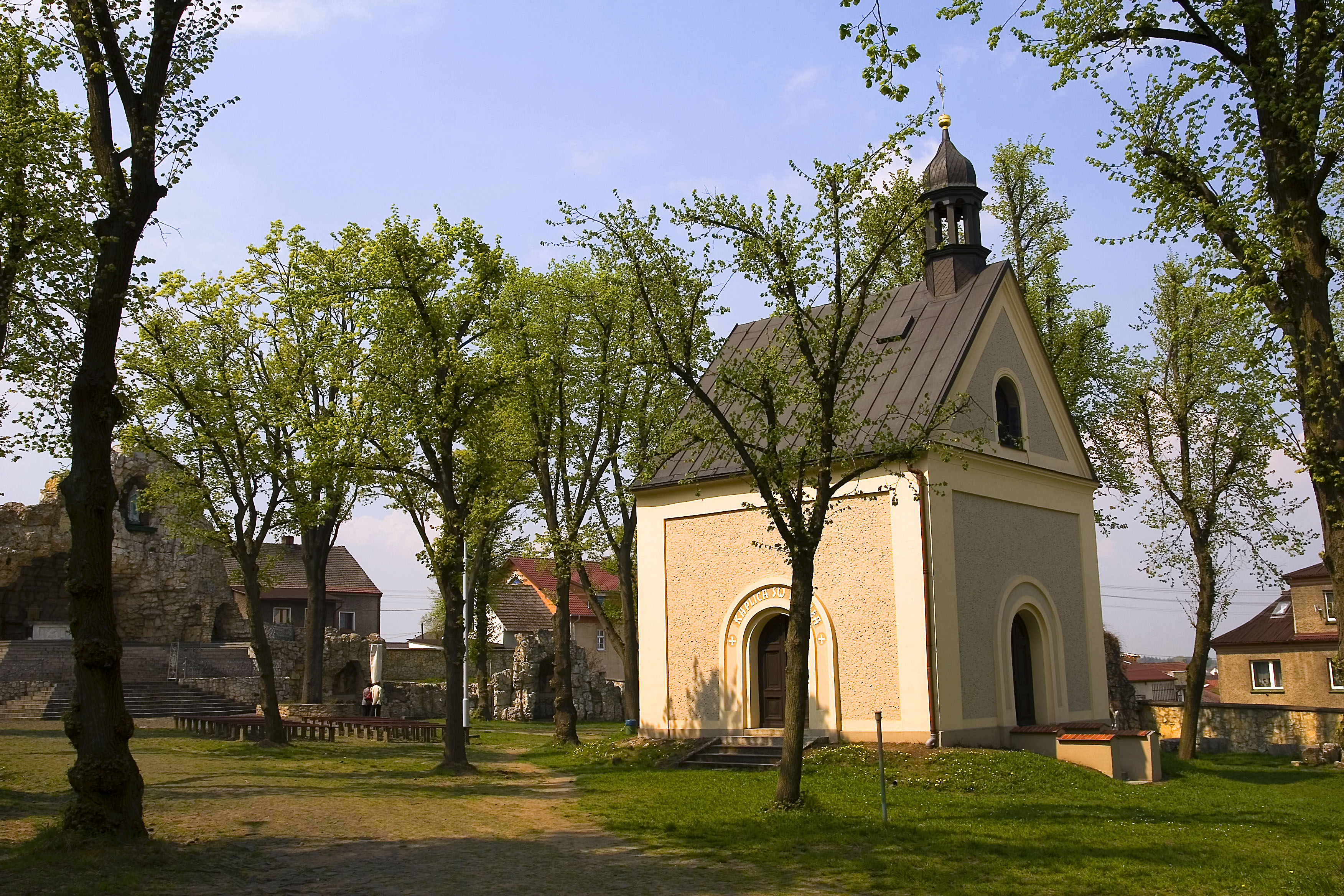 Góra św. Anny, kaplica św. Rafała. Gmina Leśnica, powiat strzelecki